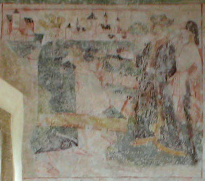 Detail der Wandmalereien in der Kreuzkapelle Duttenberg. Die Szene mit der Königin von Saba und König Salomon ist vor 1485 entstanden, der unbekannte Maler hat die Szene vor den Hintergrund der Silhouette der nahen Stauferpfalz Wimpfen gesetzt und damit eine der ältesten Darstellungen von Wimpfen hinterlassen.